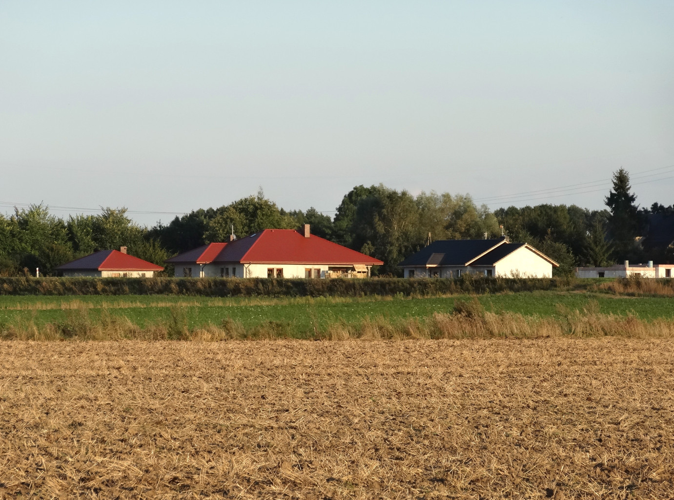 Otorowo, gmina Solec Kujawski, powiat bydgoski, województwo kujawsko-pomorskie. Widok z wiślanego wału przeciwpowodziowego